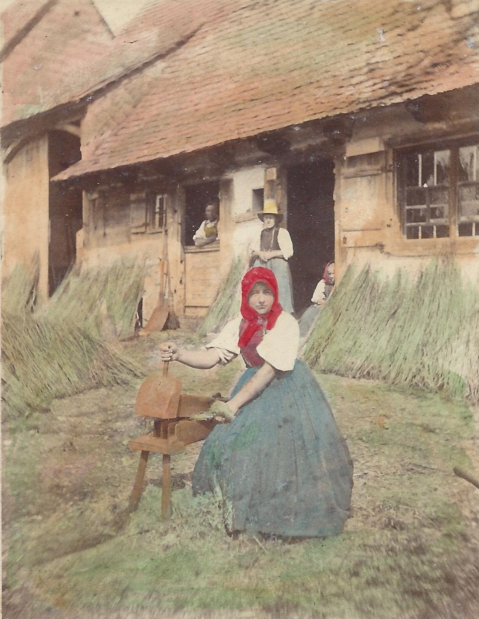 Ludovico Wolfgang Hart, getintete Fotographie N°89, aus der Galerie universelle des Peuples: Baldingen (Seekreis) auf der Baar, Vorgang des Flachsbrechens, 1864